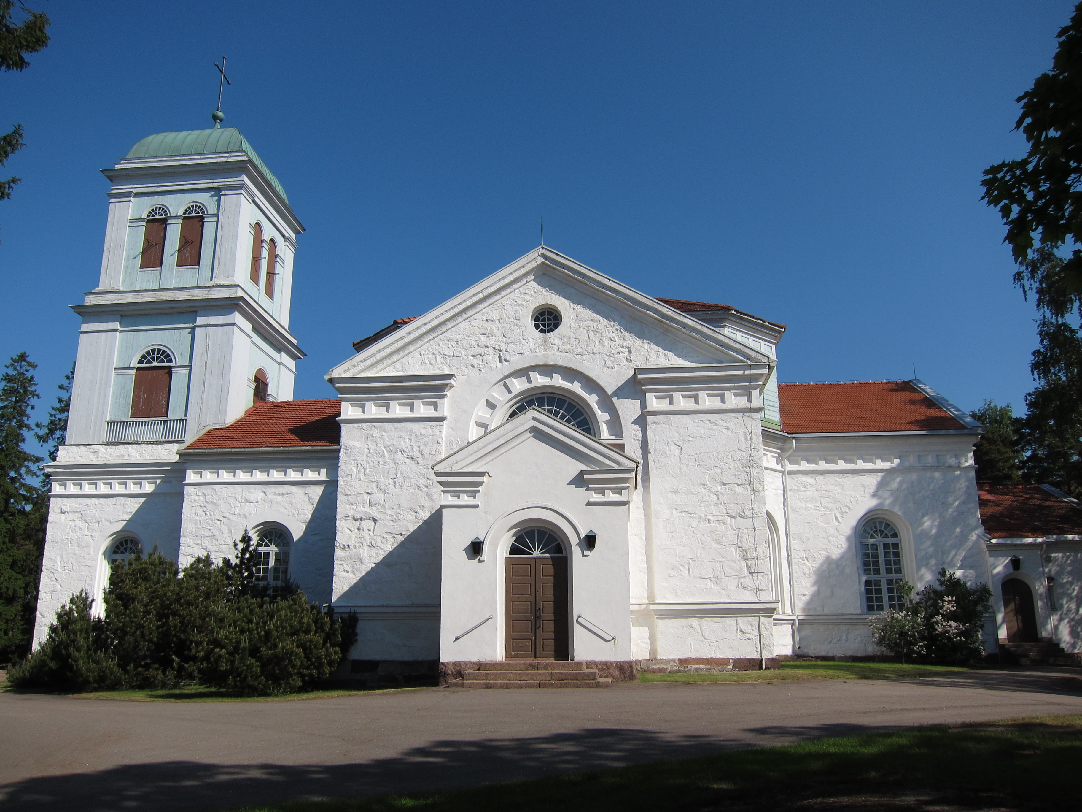 Kymin kirkko Kotkassa Helilän kaupunginosassa.